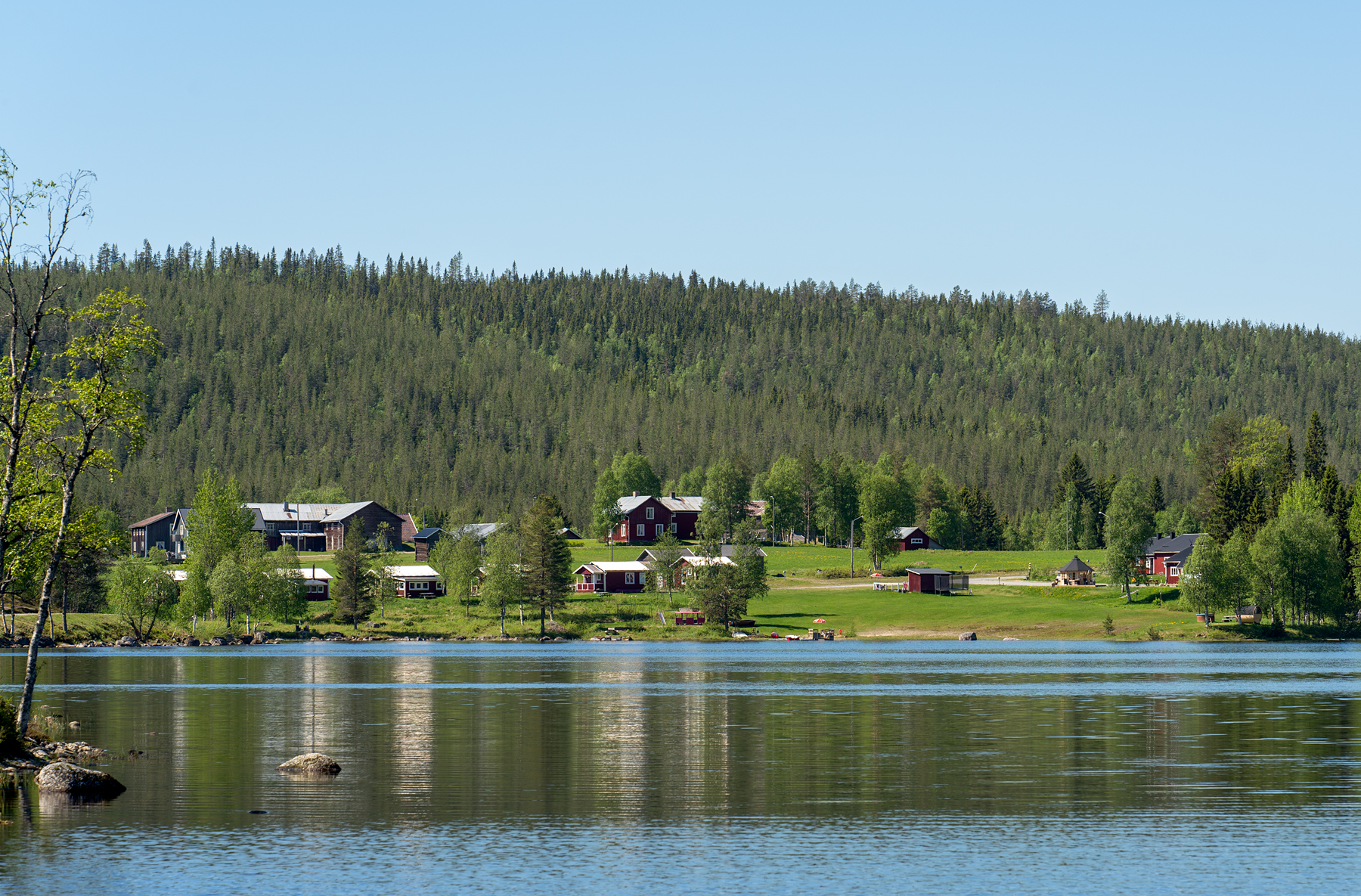 Rödvattenssjön med byn Rödvattnet i bakgrunden.